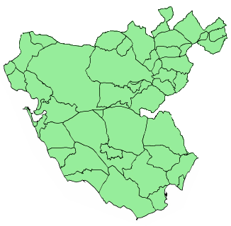 Municipios de Cádiz (España) Municipalities of Cádiz (Spain)